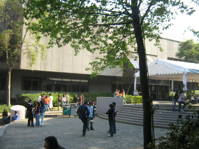 Bilblioteca de la Facultad de Contaduria y Administración C.P. Alfredo Adam Adam